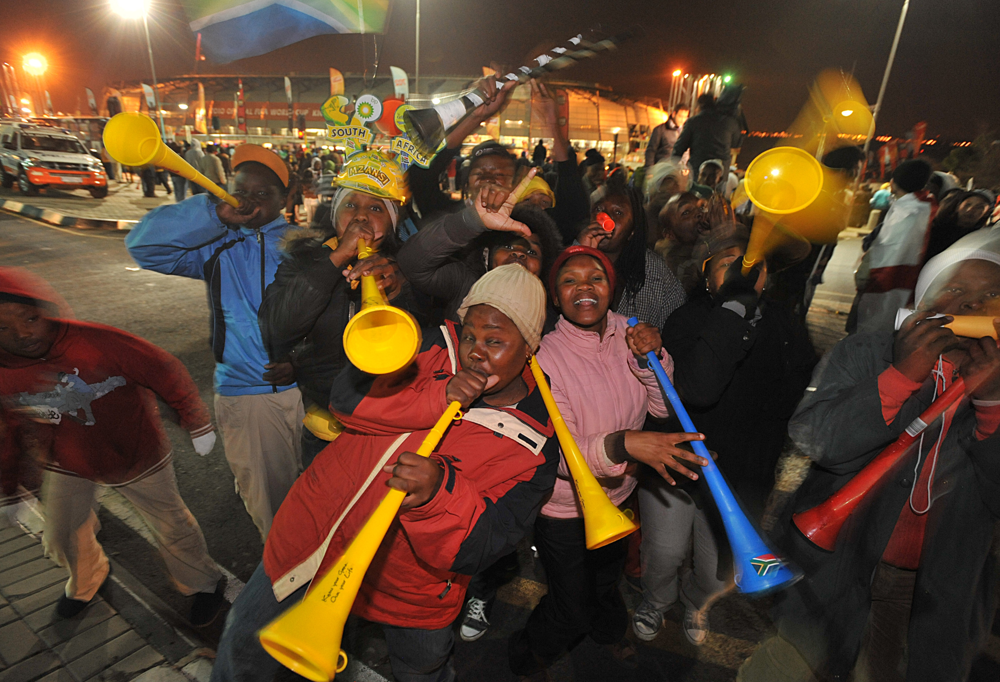 Joanesburgo - Movimento do lado de fora do Orlando Stadium, durante show de abertura da Copa de 2010.